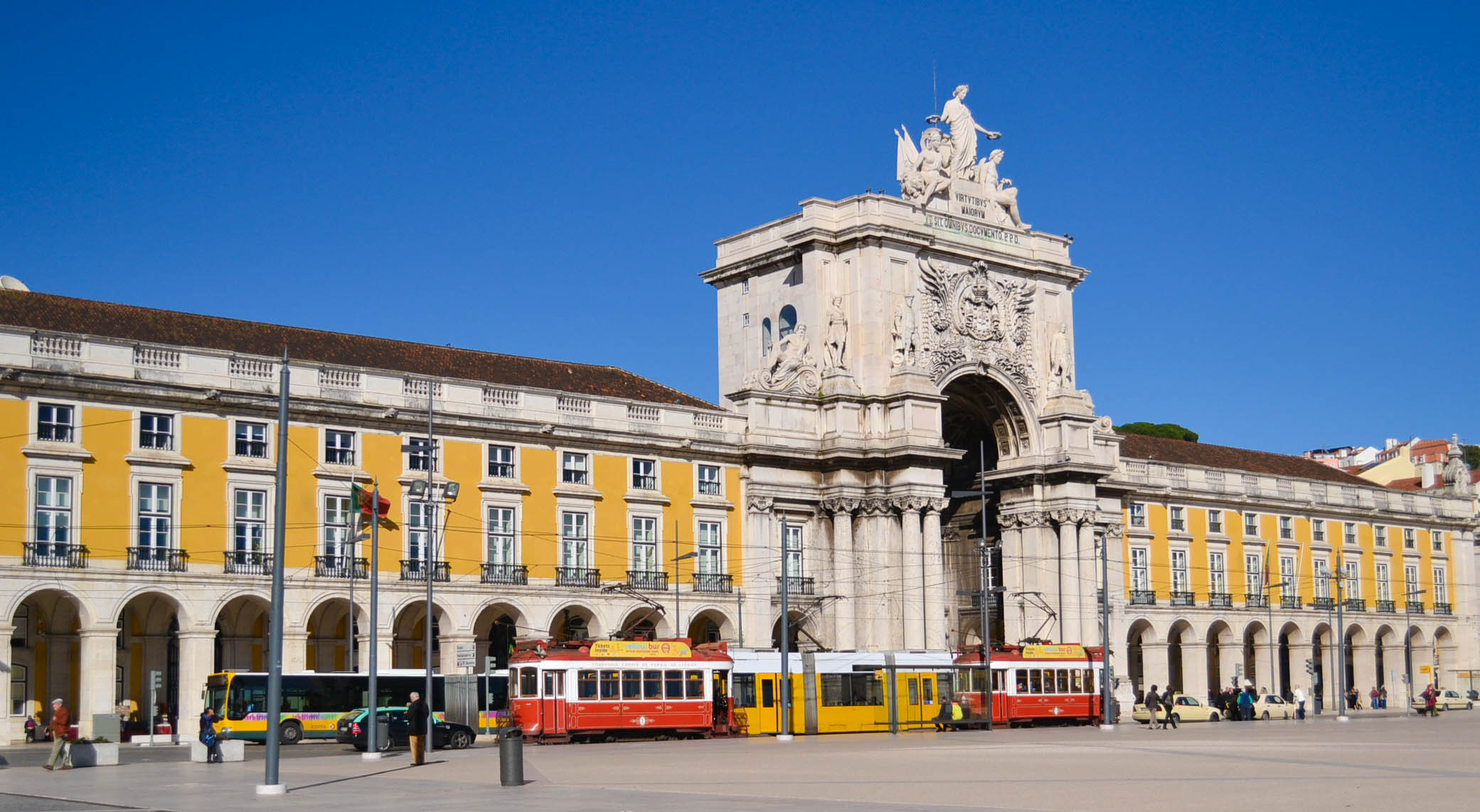 Praça do Comércio